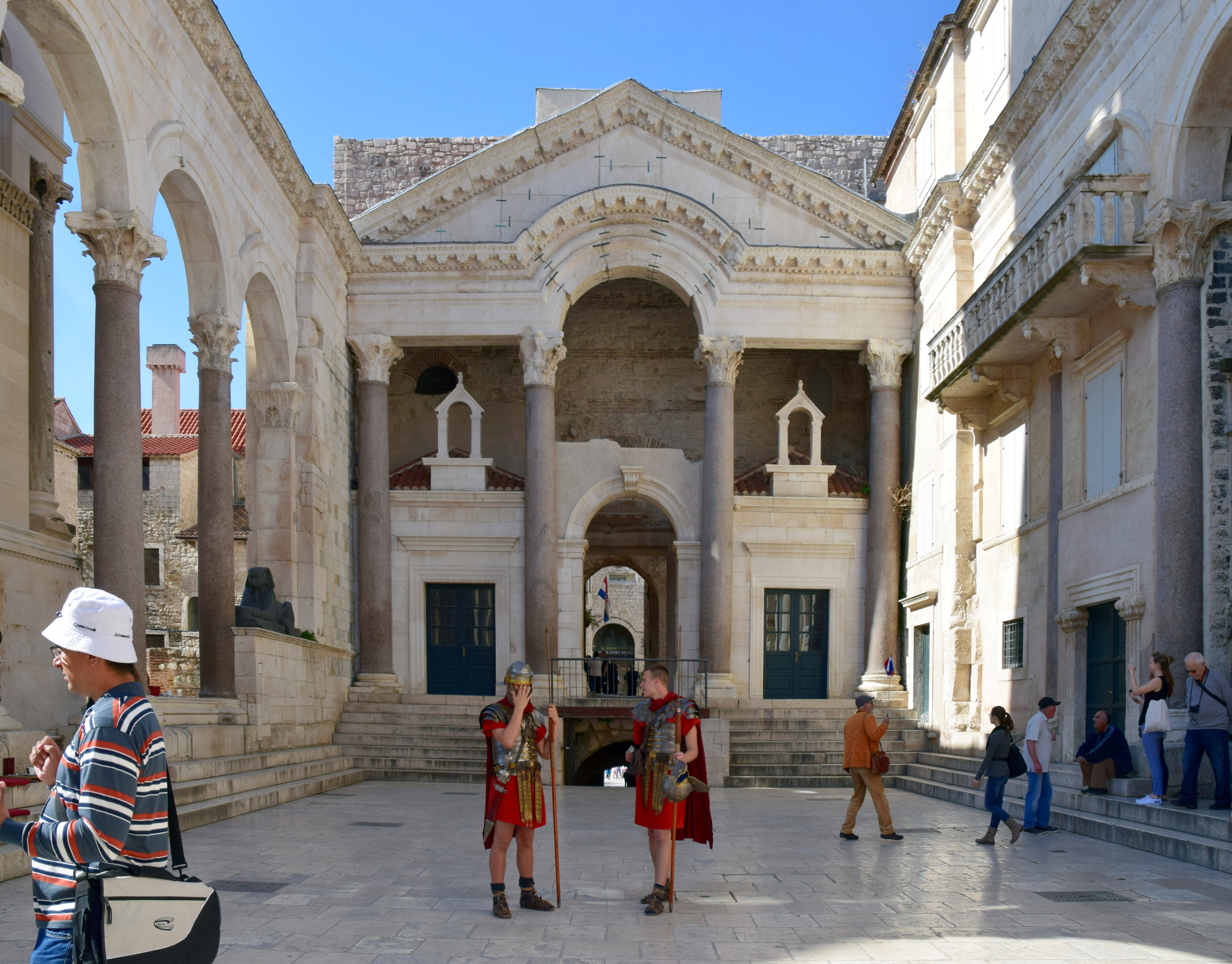 Peristyl des Diokletianpalastes in Split/Kroatien